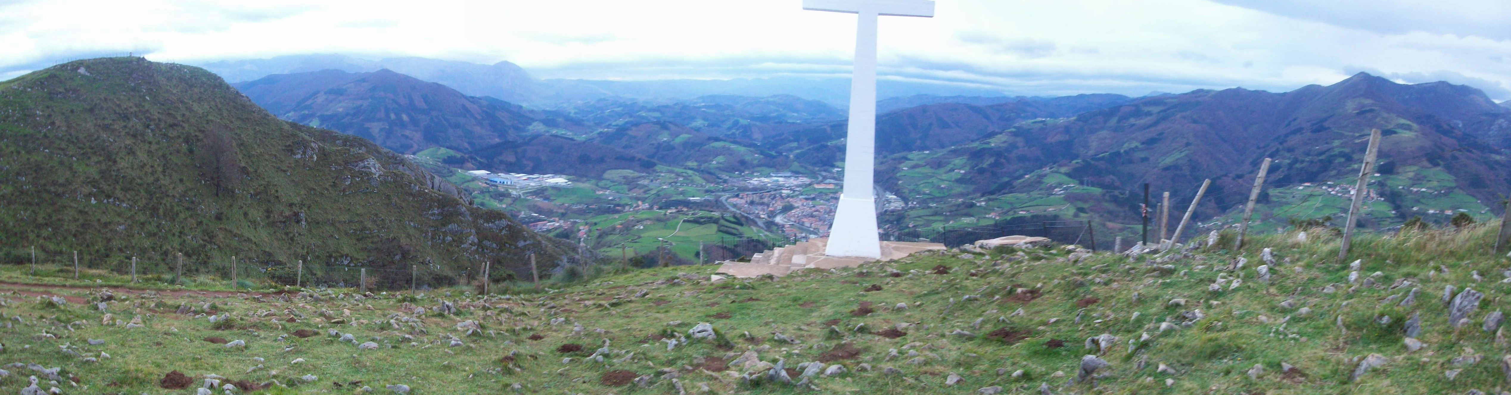 Uzturre mendiko gailurretik ikus daitekeen ikuspegia